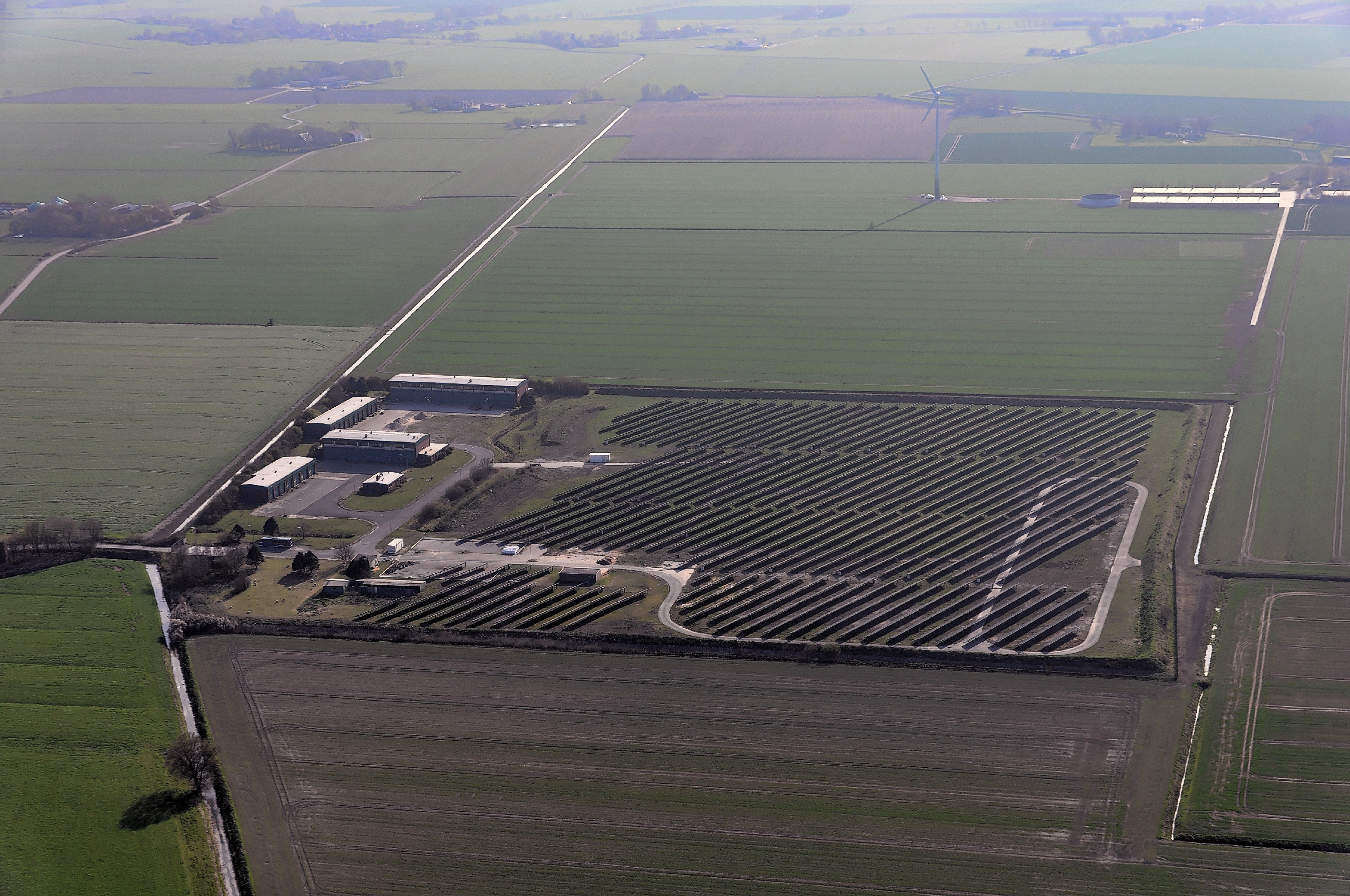 Luftbilder von der Nordseeküste 2013-05: Solarpark Mederns